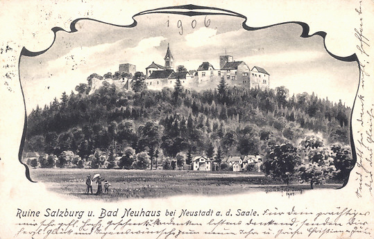 Ansichtskarte von Eugen FelleMotiv: Ruine Salzburg bei Bad Neustadt